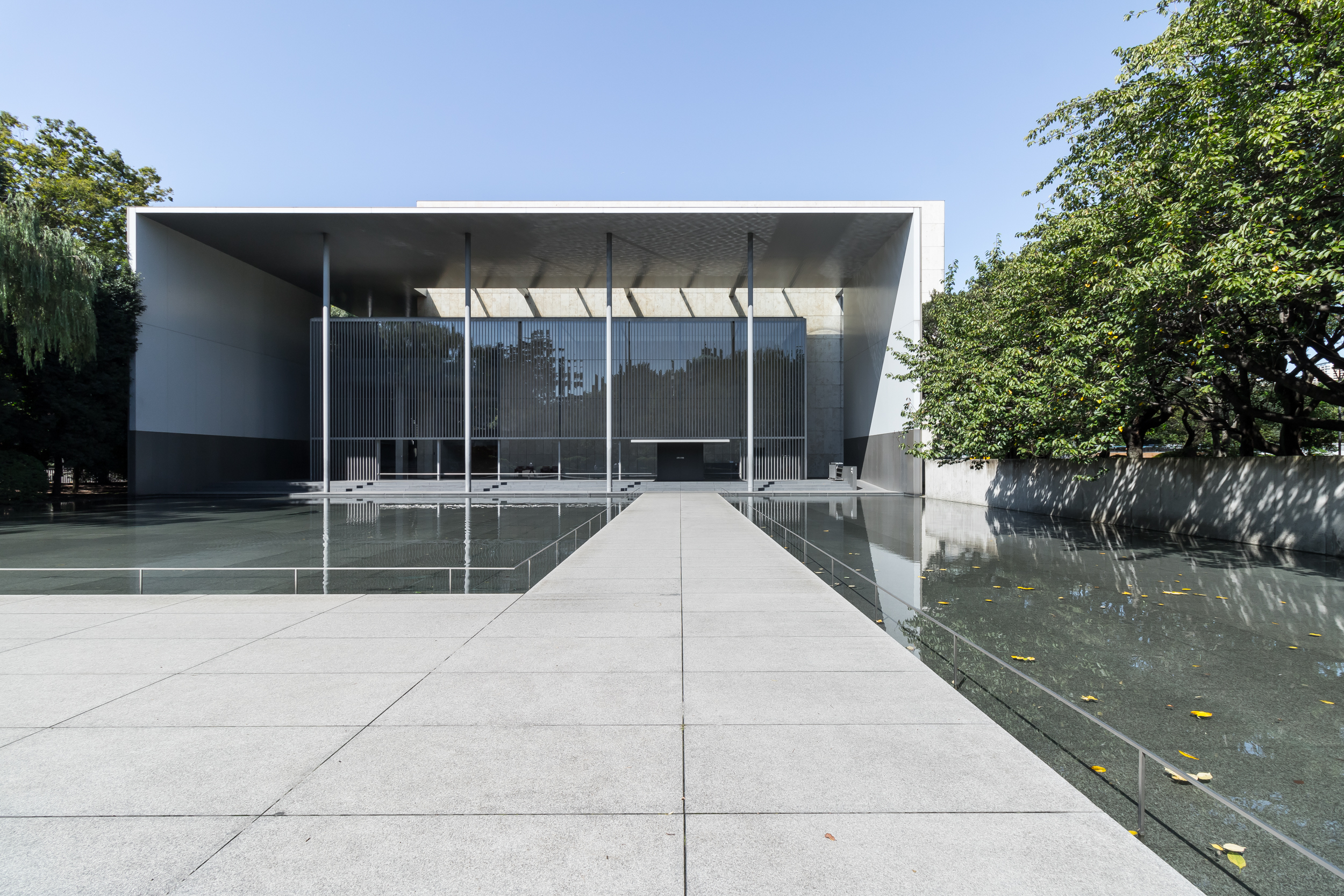 東京国立博物館 - 法隆寺宝物館（設計：谷口吉生）